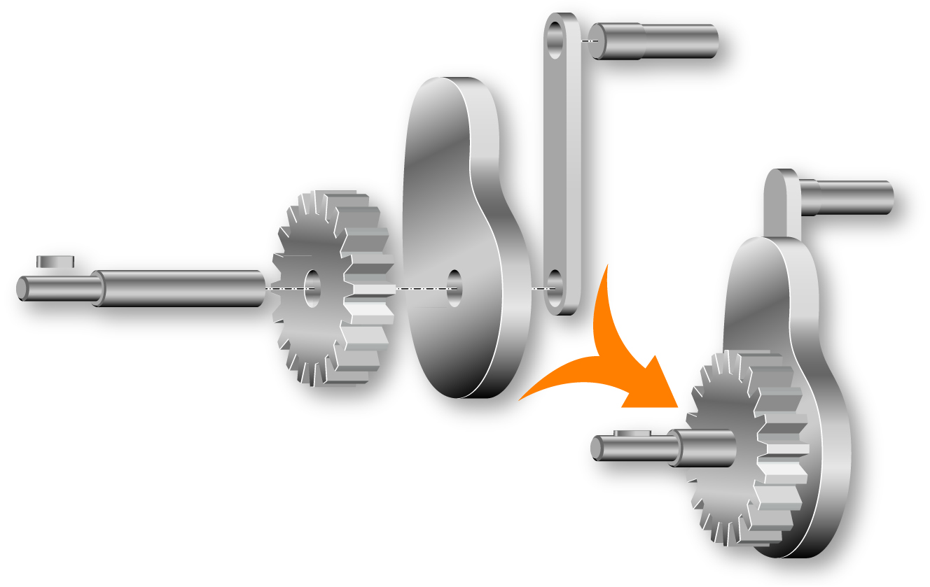 Komplexe Geometrie in einem Bauteil statt Montage vieler Einzelteile